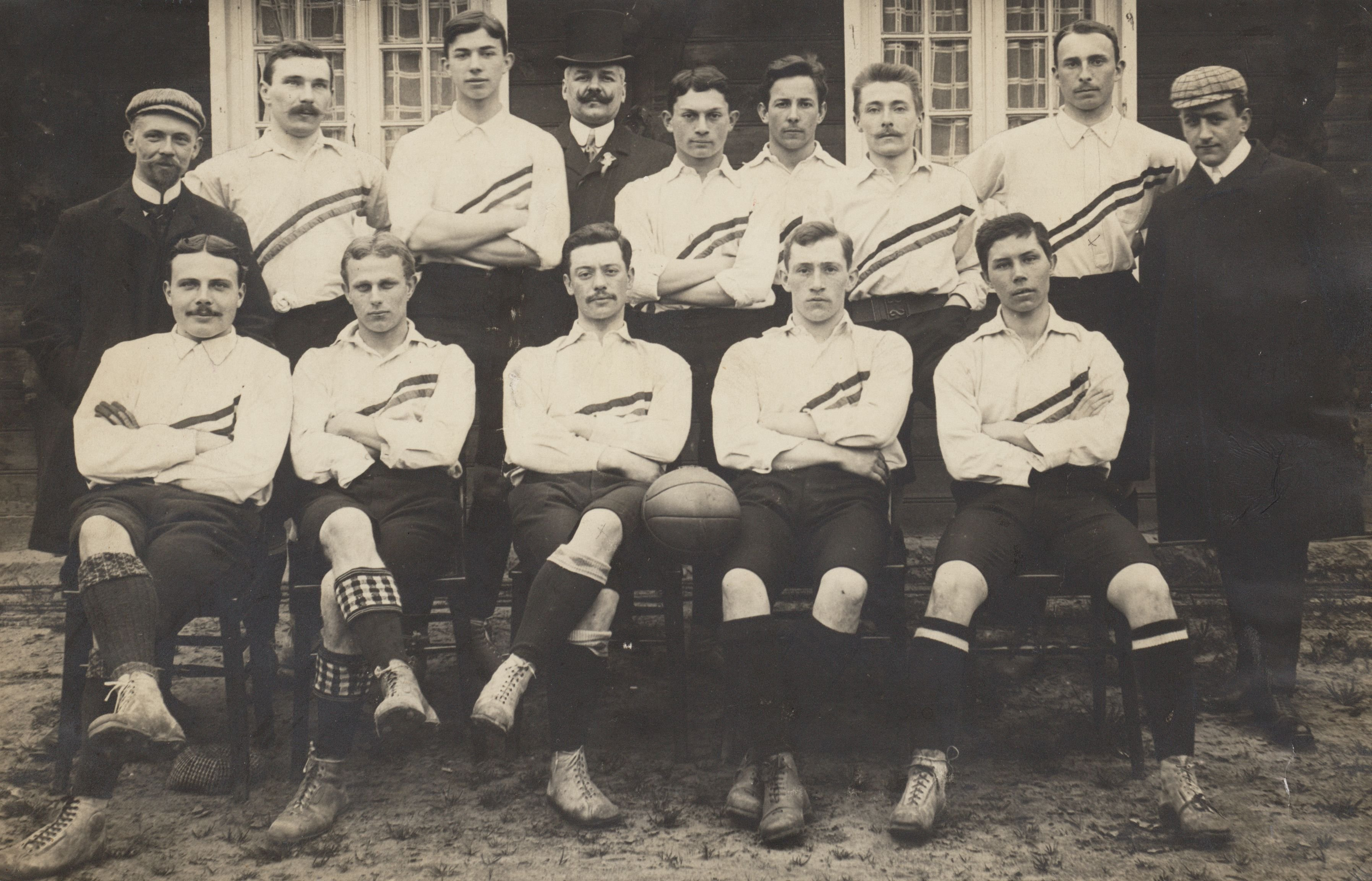 Foto van het Nederlands elftal voorafgaand aan zijn eerste interland, uit tegen België op 30 april 1905. Achterste rij: trainer Kees van Hasselt, Bok de Korver, Guus Lutjens, de Belgische official Paul Havenith, Ben Stom, Dolf Kessler, Peet Stol, Eddy de Neve, grensrechter Bep Willing. Voorste rij: Reinier Beeuwkes, Karel Gleenewinkel Kamperdijk, Rein Boomsma, Dirk Lotsy, Willy de Vos.